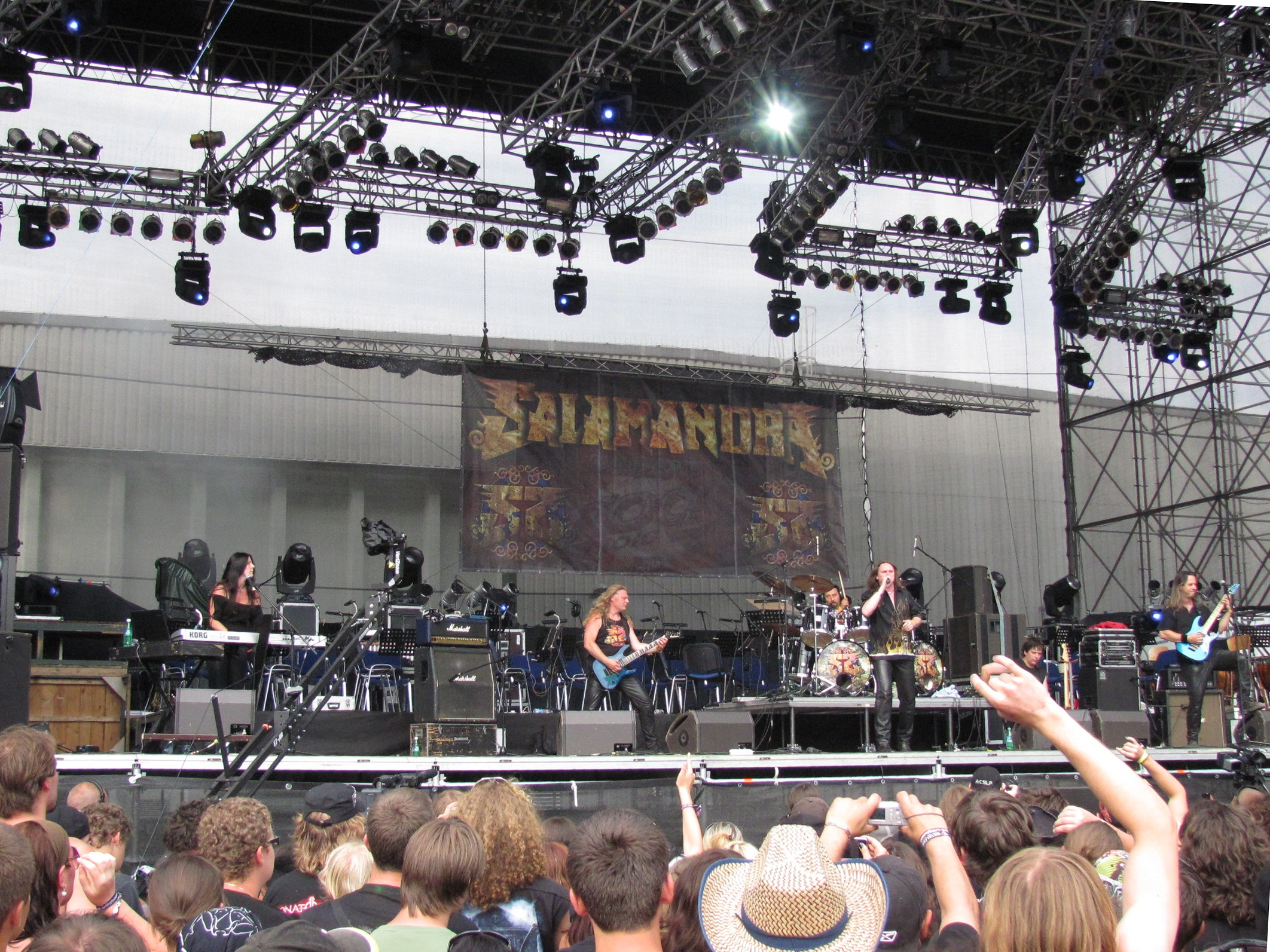 Salamandra, Ronnie James Dio stage, Masters of Rock 2010